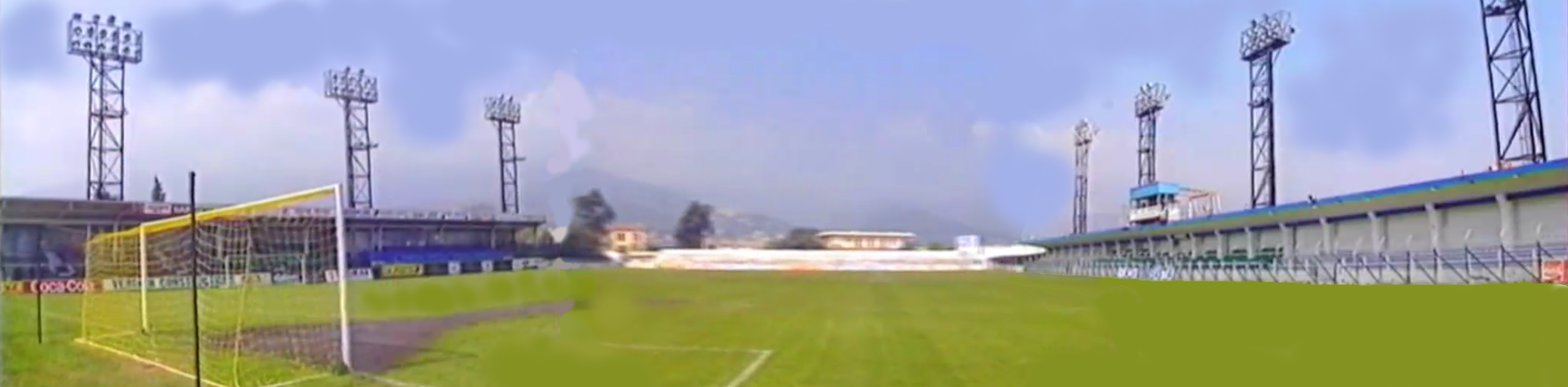 Tribune Sud (Gauche), Tribune Ouest (Centre), Tribune Nord (Droite)